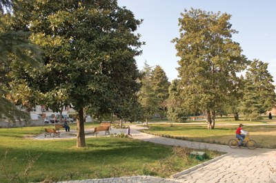 Park in Manisa, Turkey